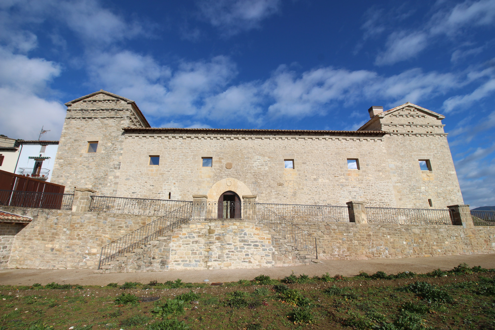 Fachada del Palacio de Olza tras su restauración.